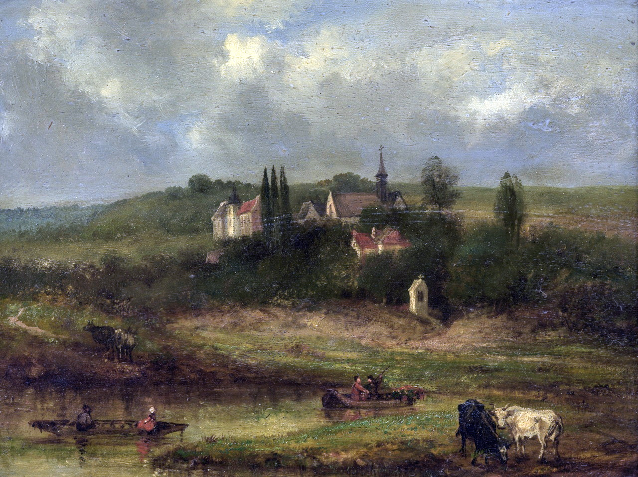 Olieverfschilderij door Alexander Schaepkens van de Varkenswaard en de Sint-Pietersberg bij Maastricht. Formaat: 28 x 37,7 cm (excl. lijst). Collectie Bonnefantenmuseum Maastricht, objectnummer 1000941 (bruikleen 1951).